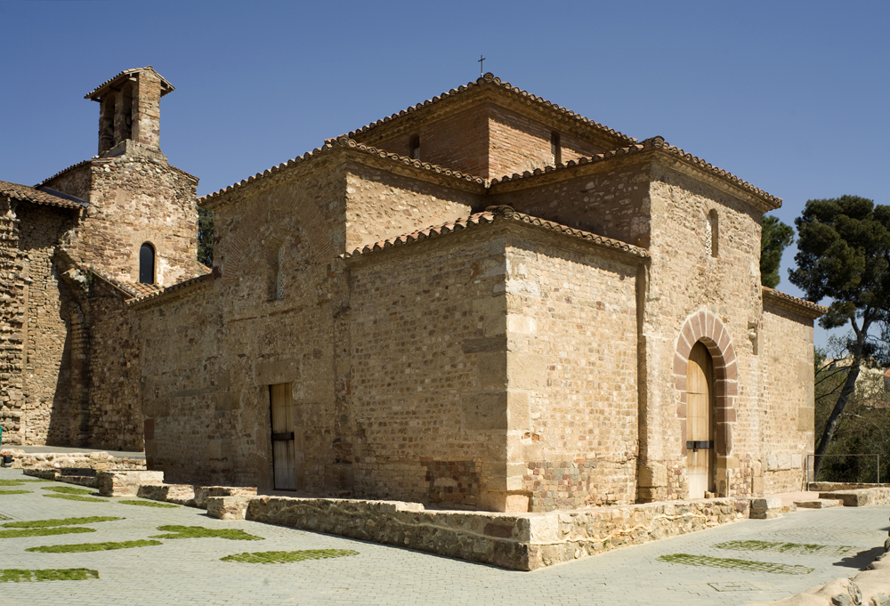 Cultural Heritage Spain